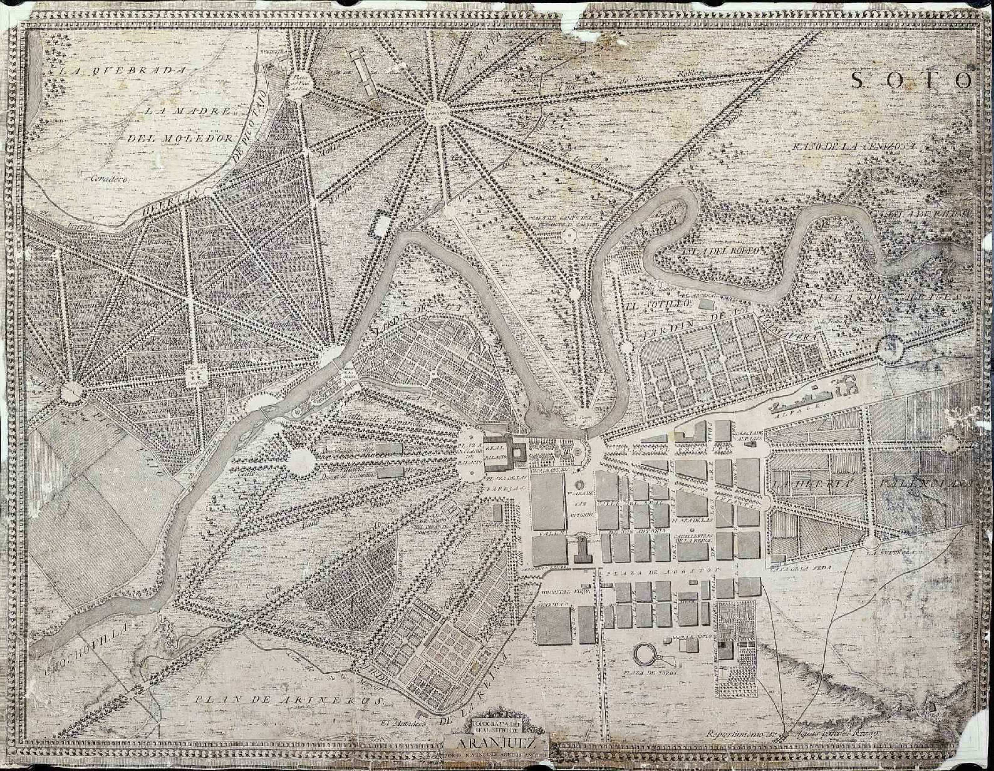 Plano de Aranjuez, 1775, de Domingo de Aguirre.